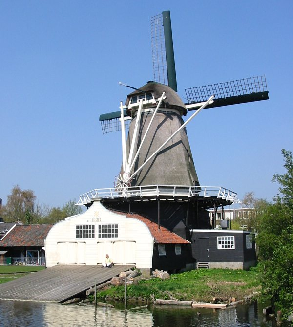 Houtzaagmolen de ster gezien bij de sleephelling.